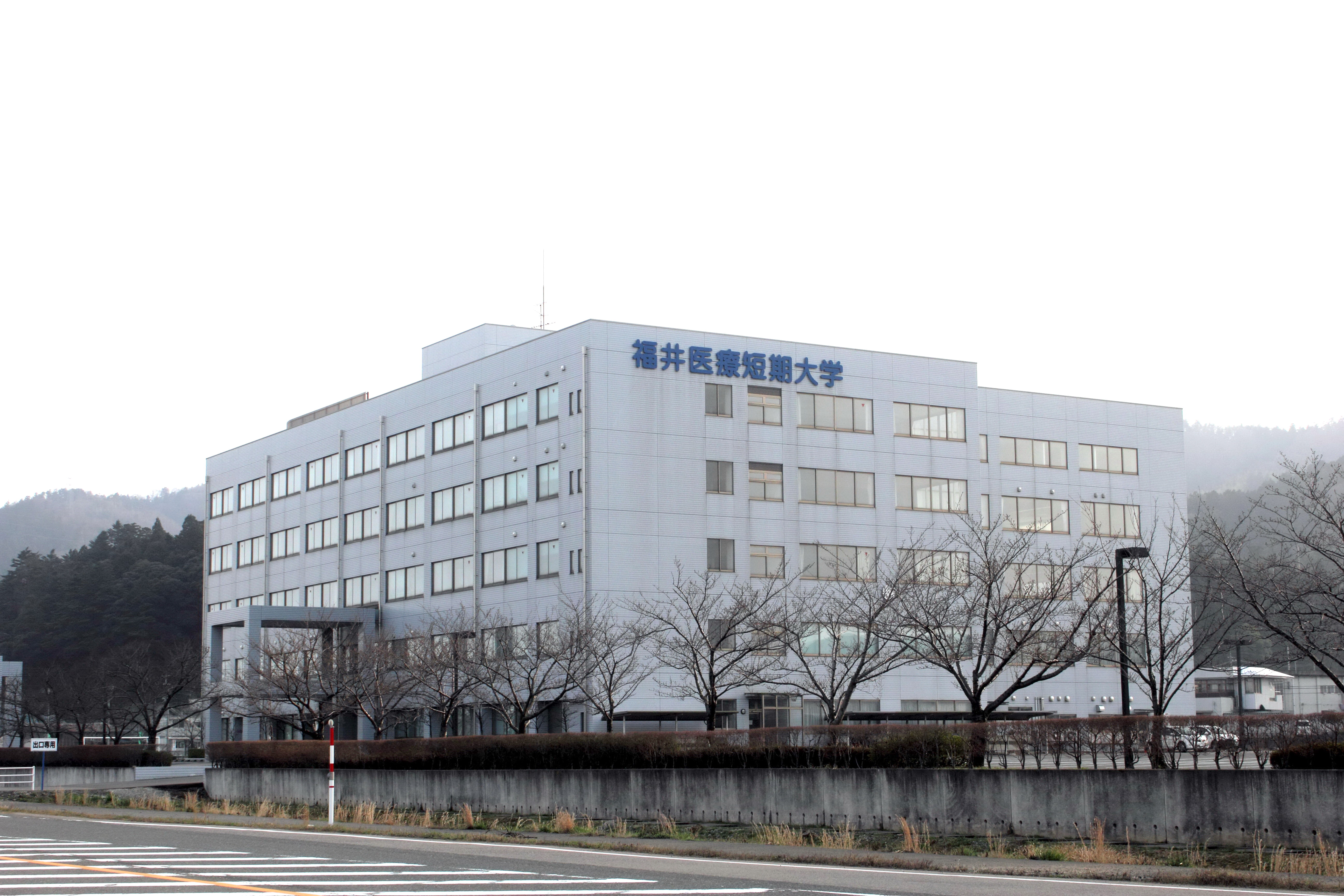 福井医療短期大学